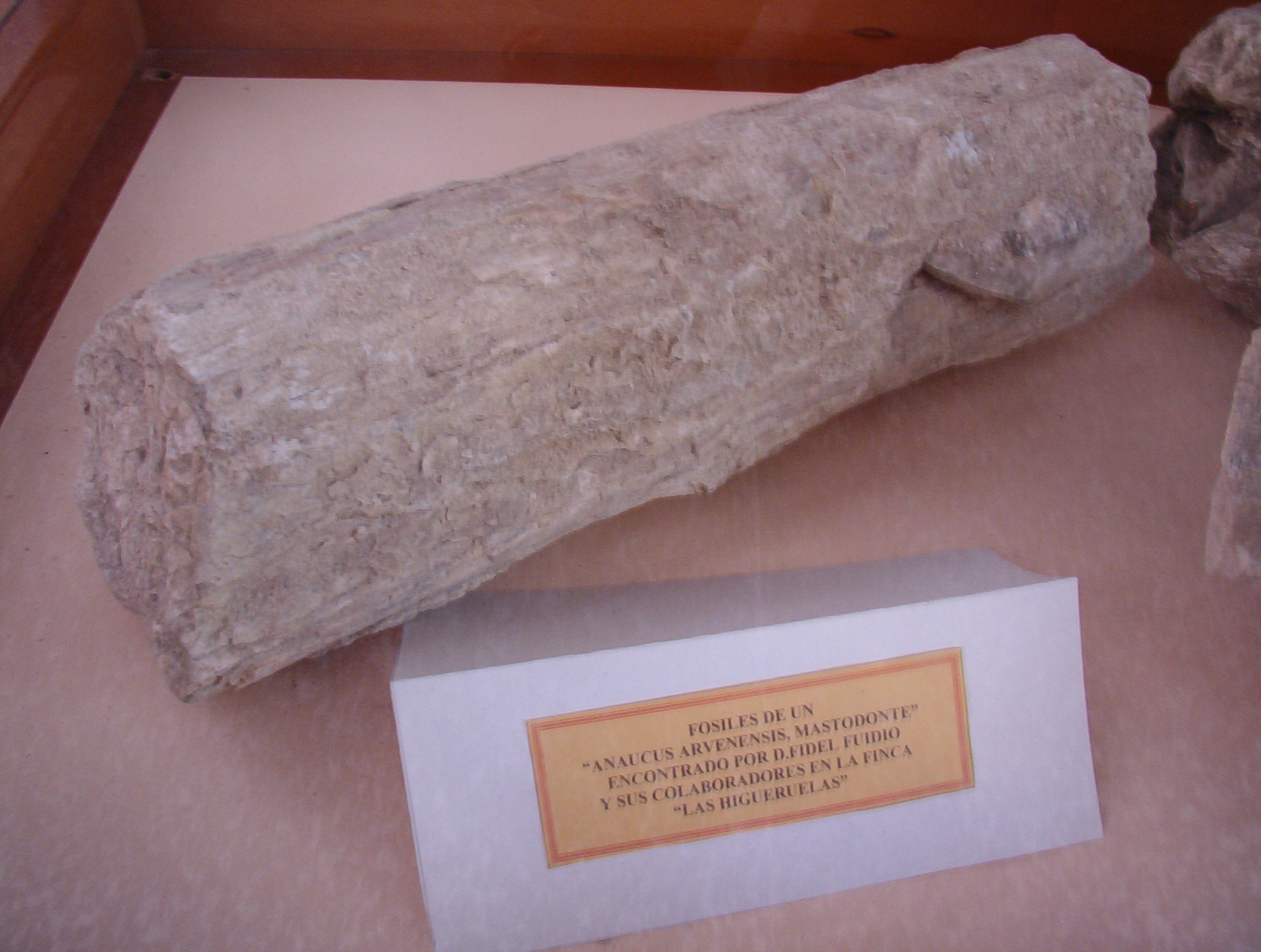 Fosíl recuperado por D. fidel Fuidio en el yacimiento de las Higueruelas en 1936 y se encuentra expuesto en el Colegio Nª Sª del Prado de Ciudad Real, España